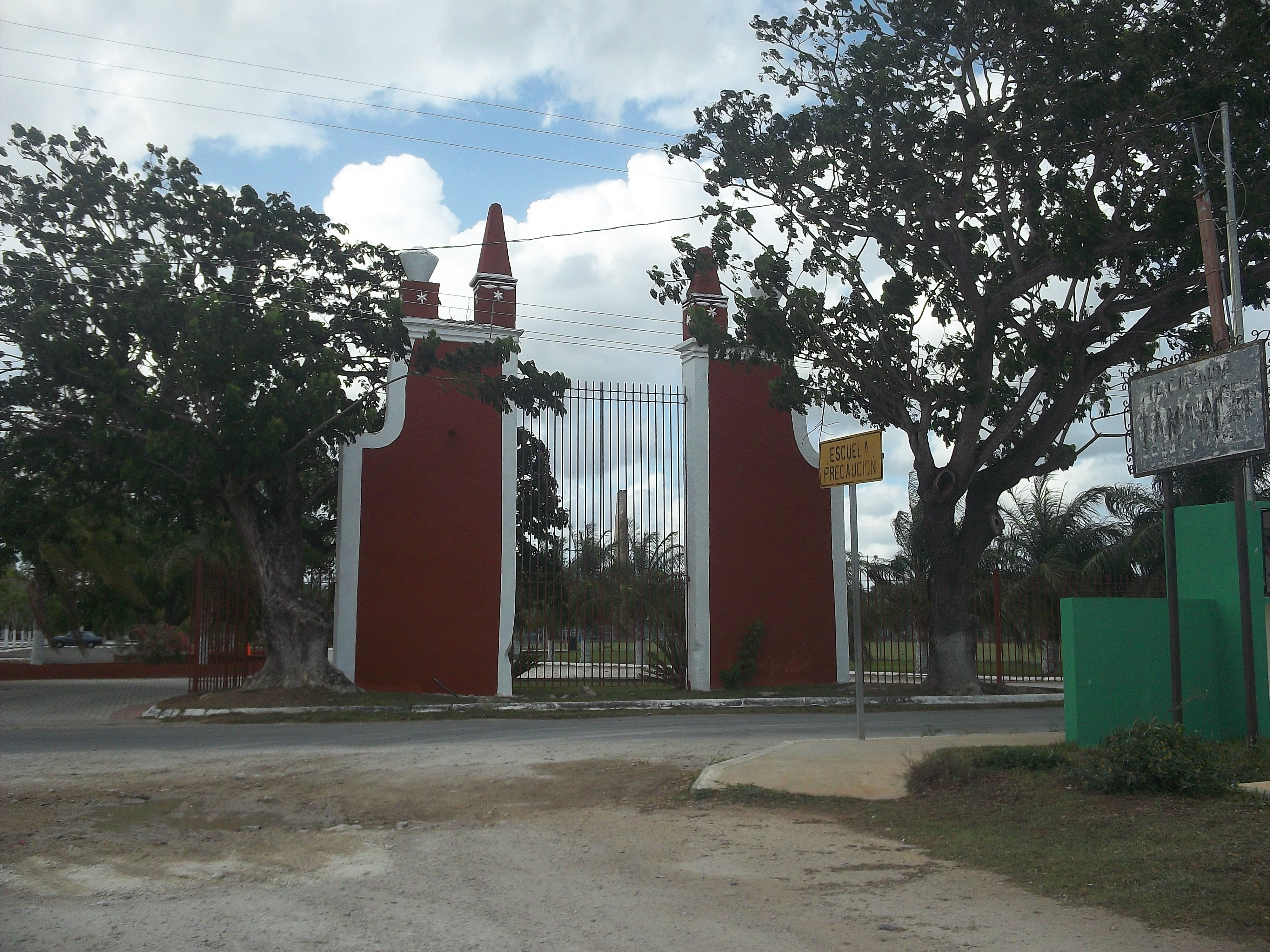 Hacienda Tamanché, Yucatán.